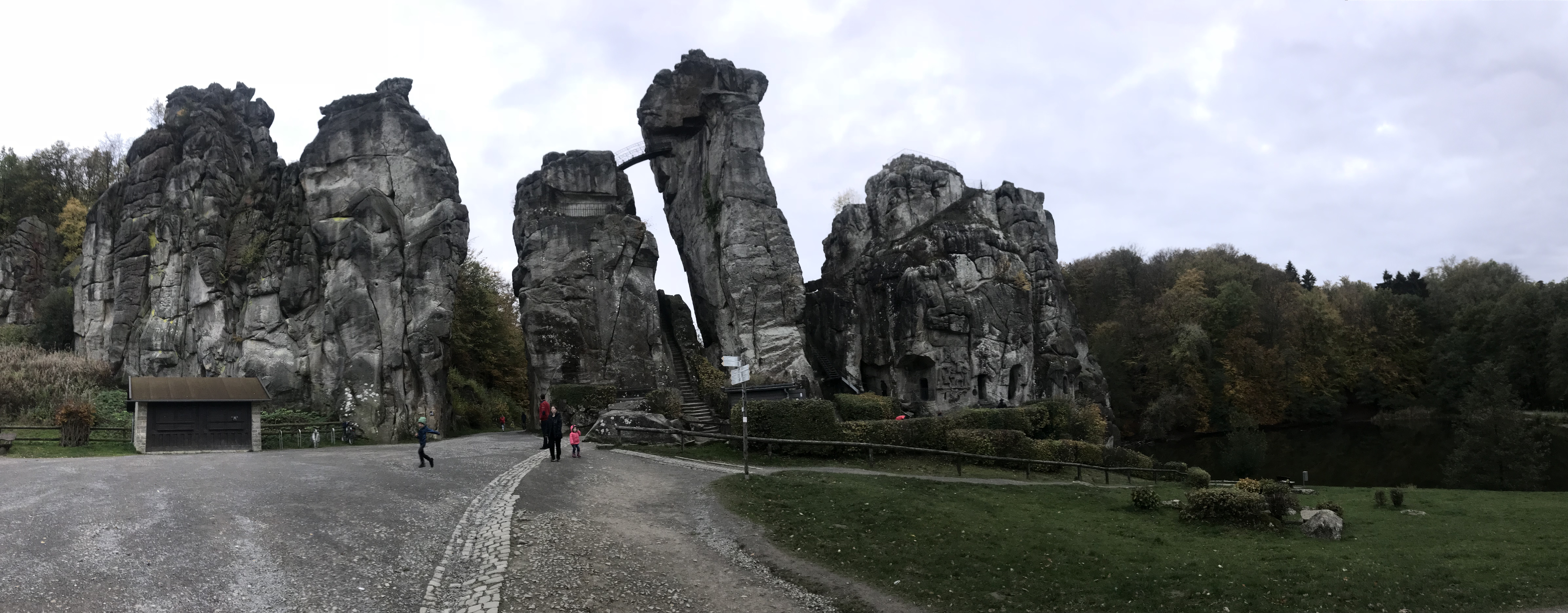 Externsteine, Outubro de 2018.